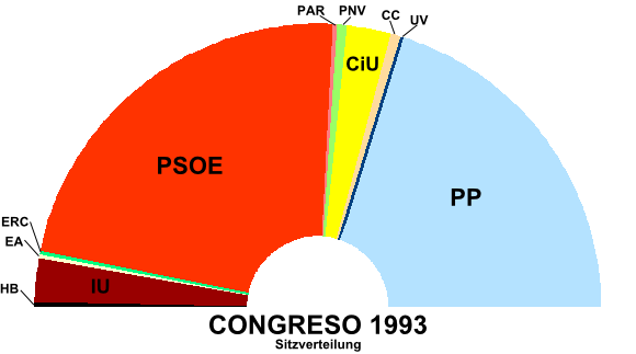 Sitzverteilung span. Congreso 1993